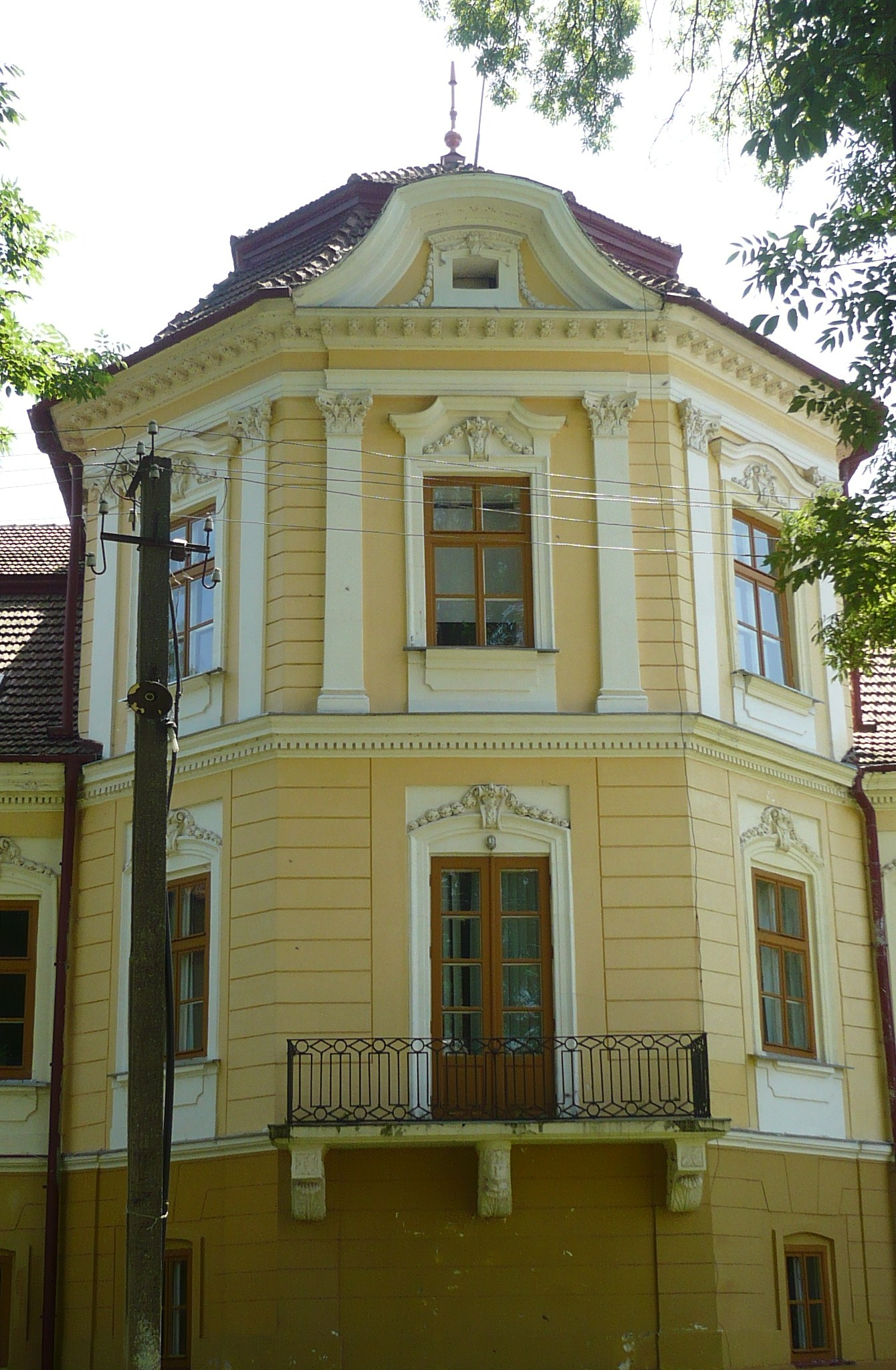 Pałac. Lubień Wielki